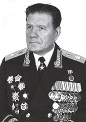 Иван Егорович Шавров (1916 — 1992) — советский военачальник, генерал армии